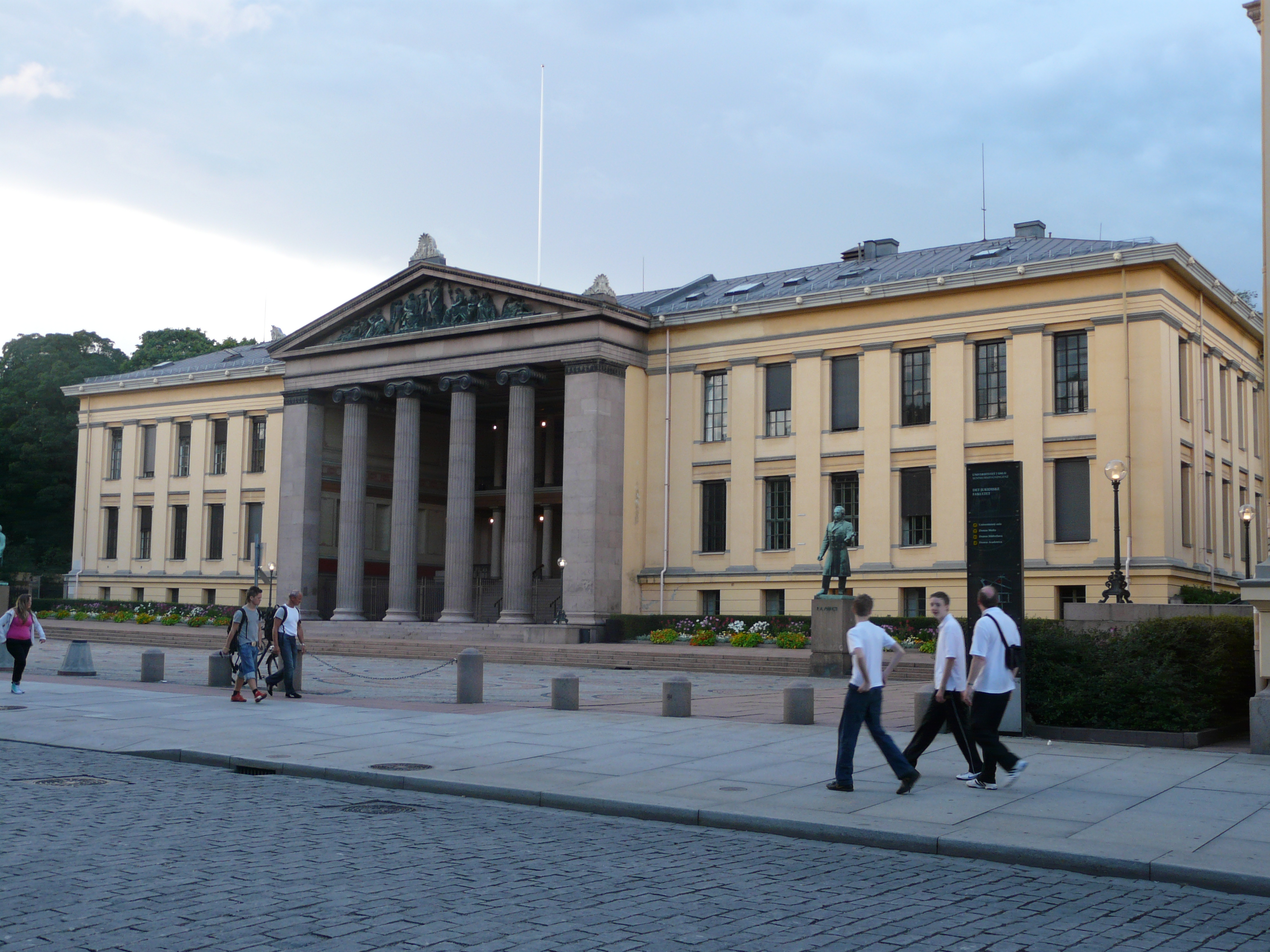 Gebouw aan de Karl Johans Gate in Oslo